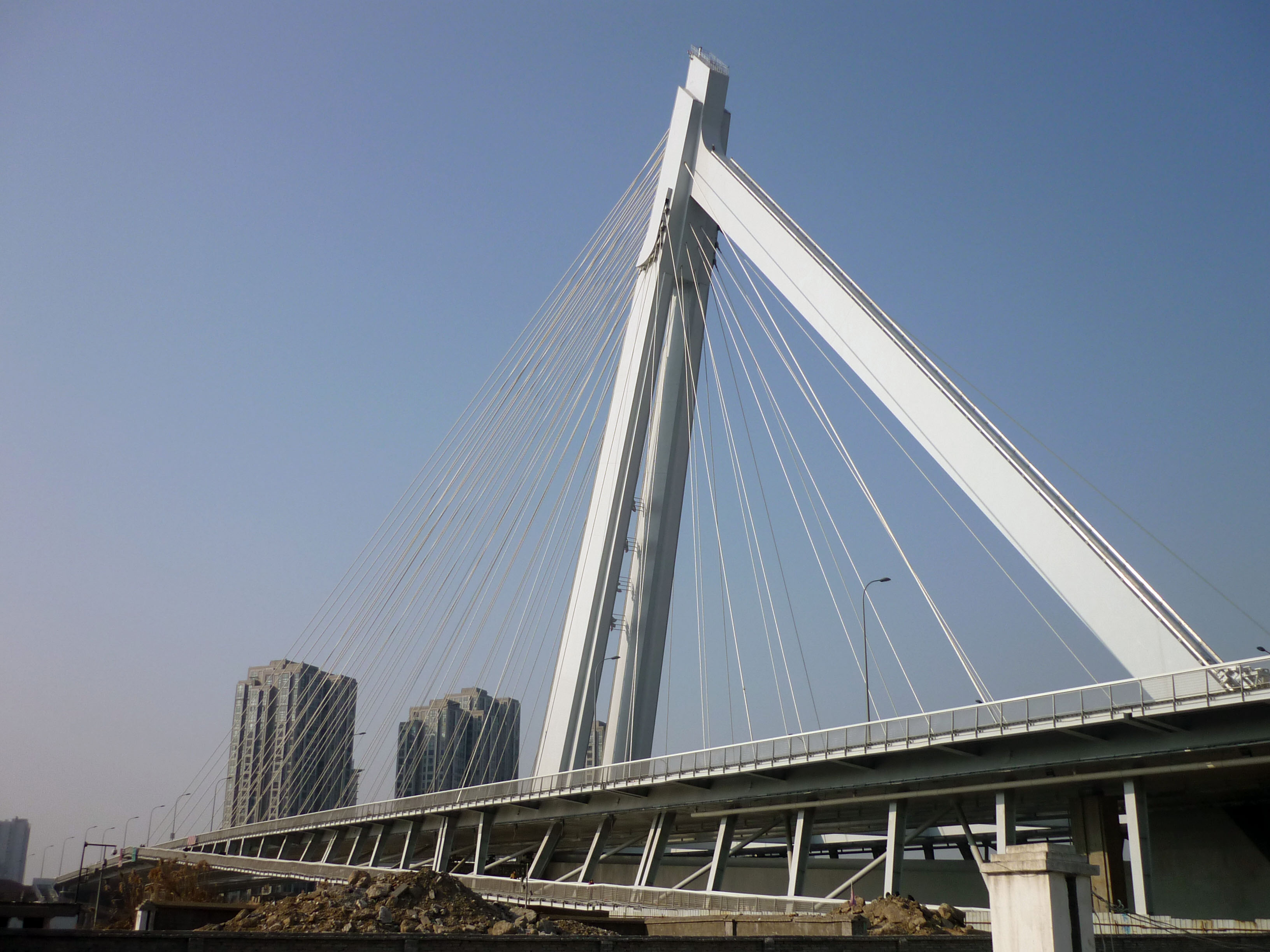 外滩大桥主塔